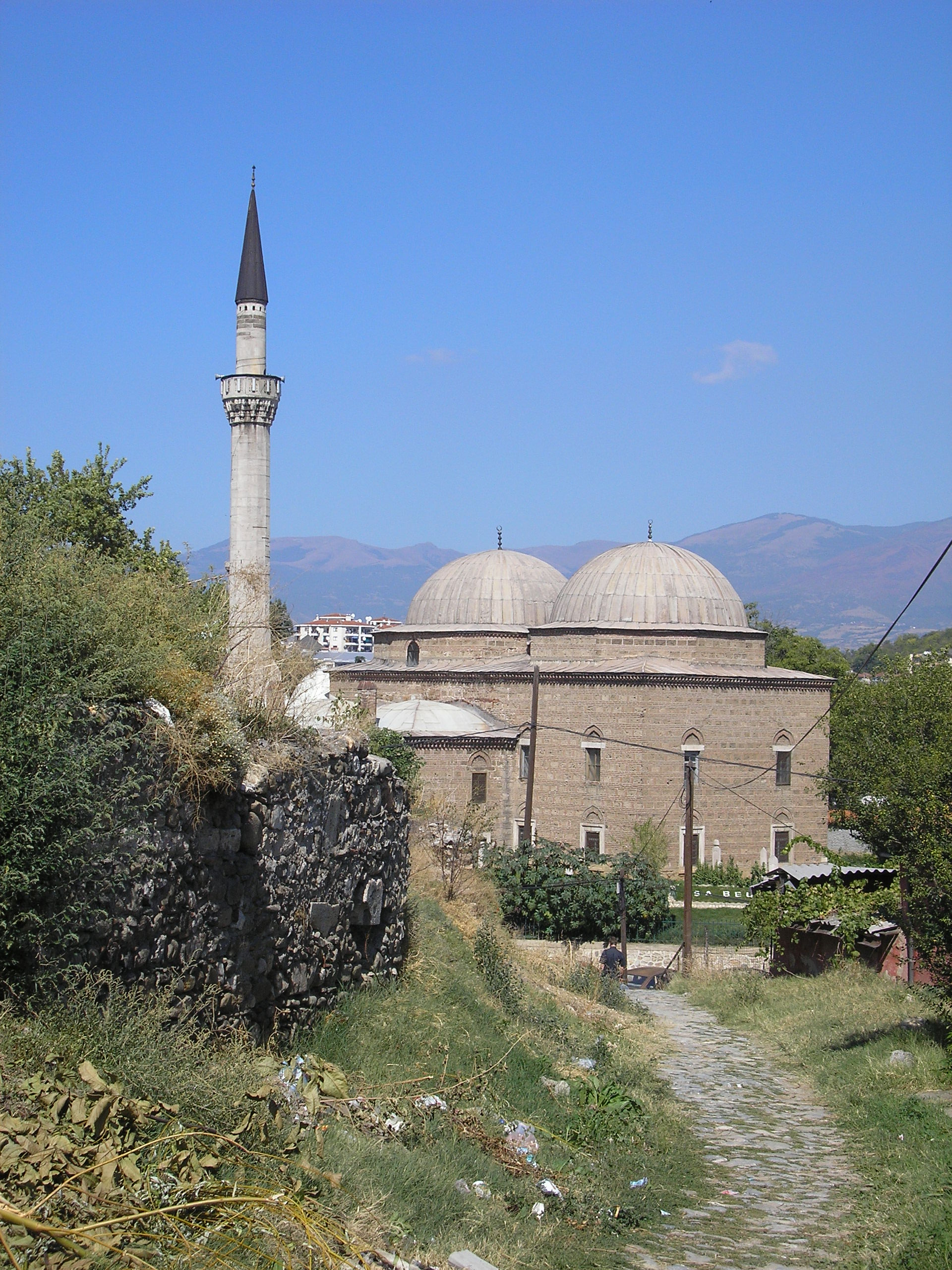 issa bey moschee skopje